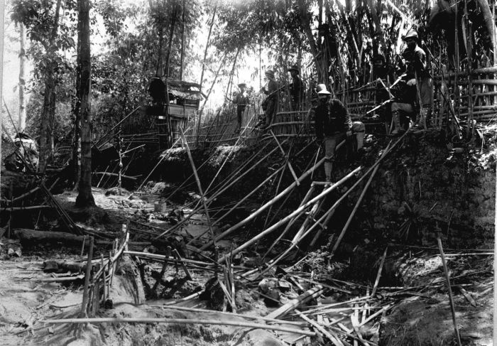 foto. Deze foto is genomen nadat het dorp door de Marechaussee was ingenomen tijdens de tocht naar de Gajo- en Alaslanden onder leiding van overste Van Daalen.. Marechaussee bij de door hen vermoorde inwoners van de versterkte kampong Penosan